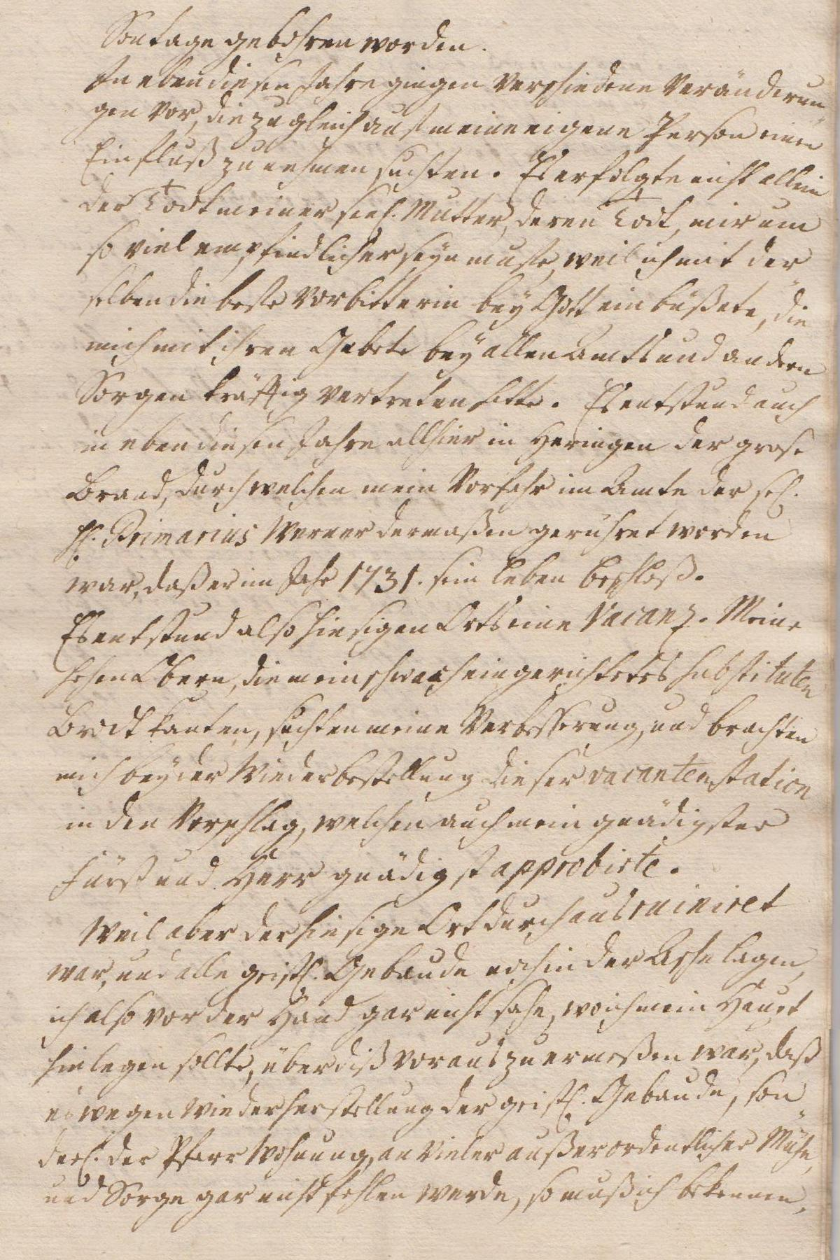 Seite 9 der Leichenpredigt für den Pastor August Wilhelm Reinhart (1696/1770), Bürger der Stadt Heringen an der Helme.